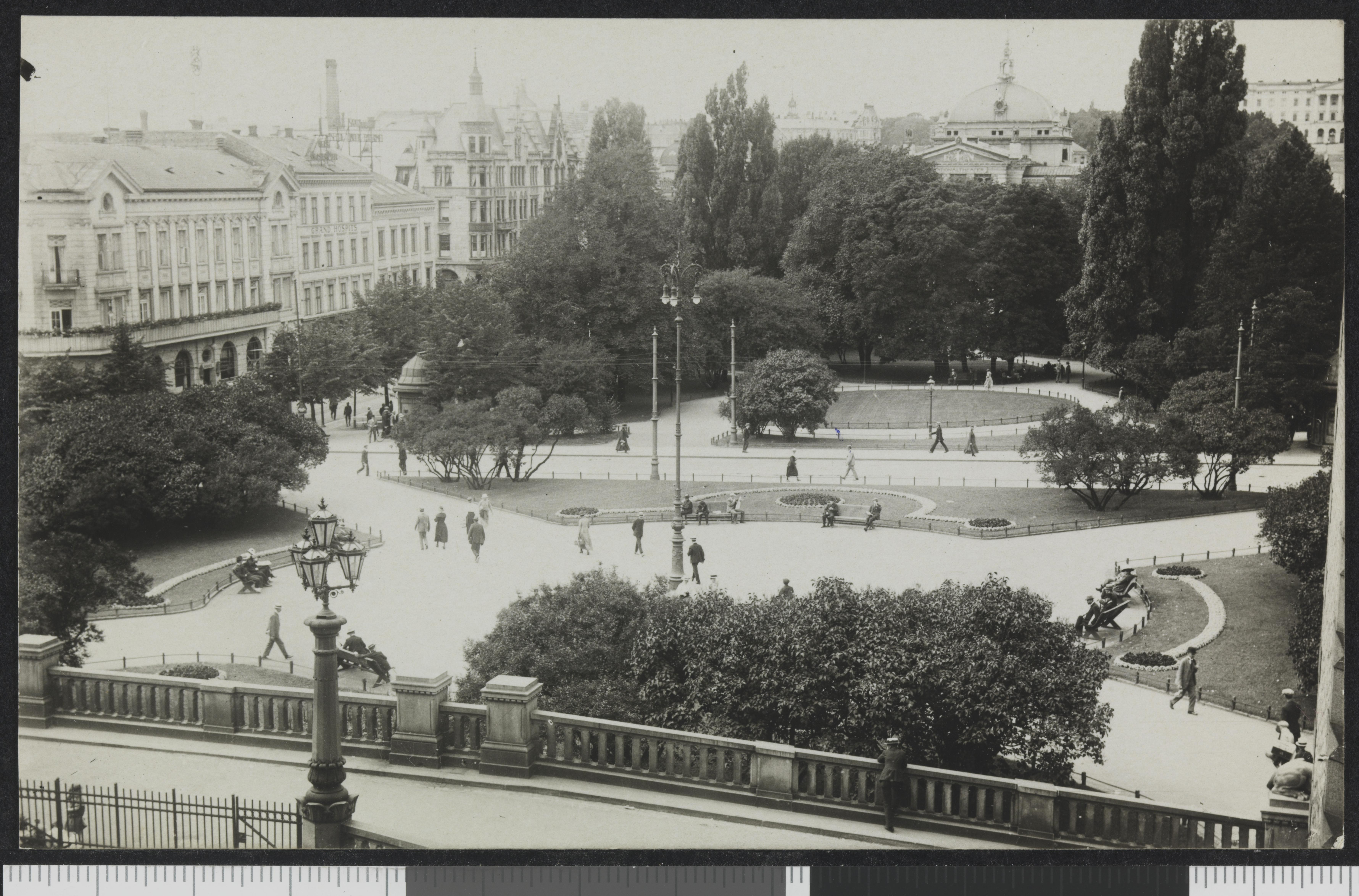 Bildet er hentet fra Nasjonalbibliotekets bildesamling Eidsvolls plass, Oslo, Oslo